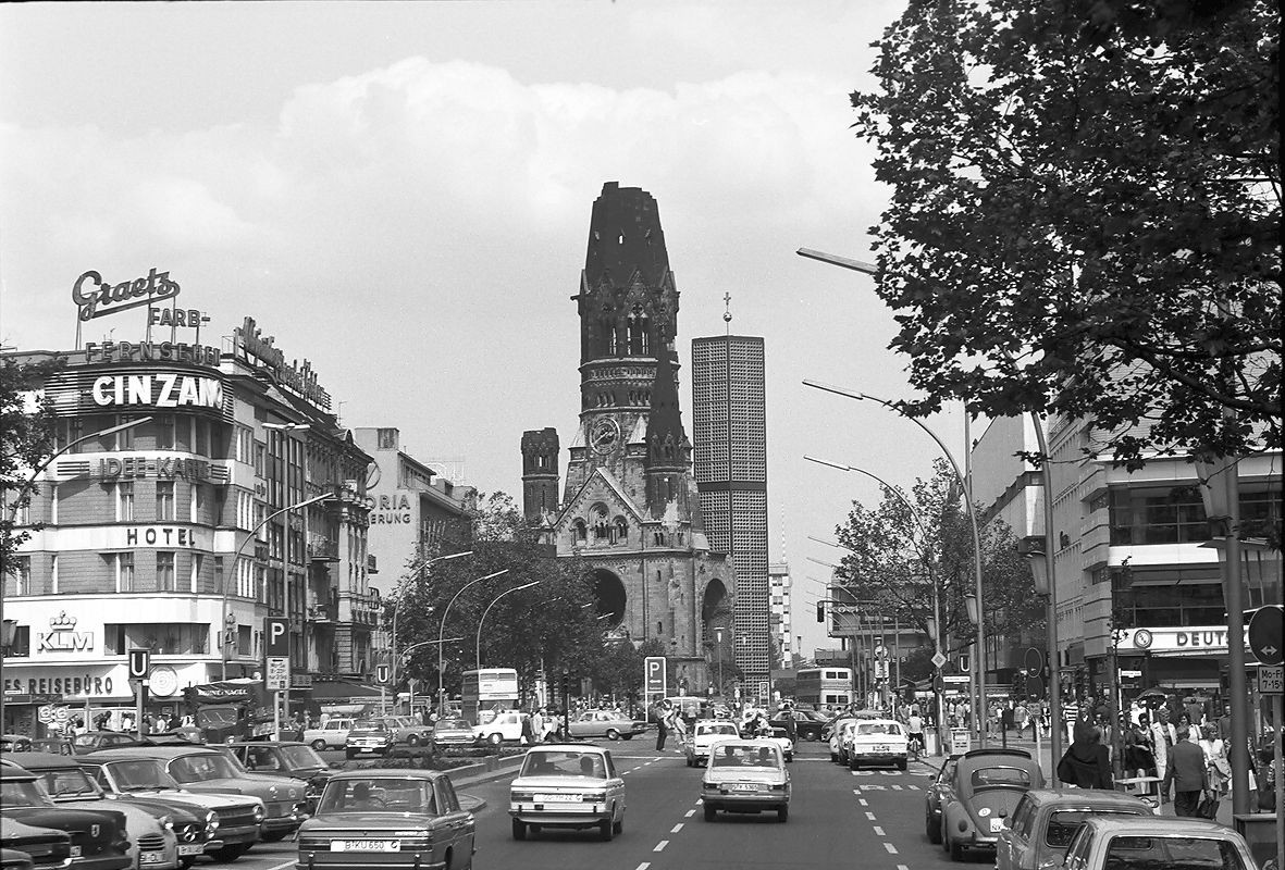 Kurfürstendamm ab Kreuzung Joachimsthaler Straße in Berlin-Charlottenburg.